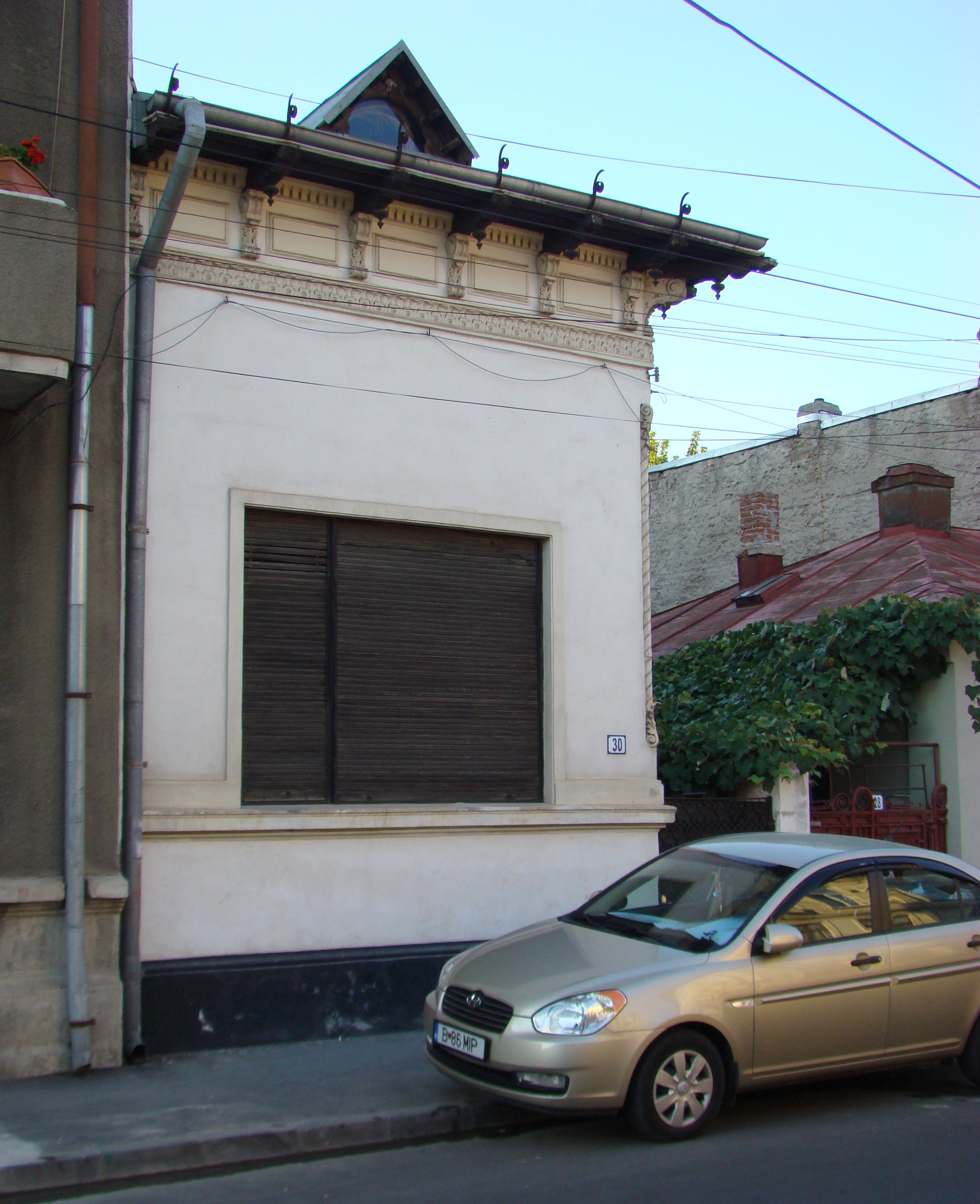 Clădire monument istoric, str. Mircea Vulcănescu, nr.30